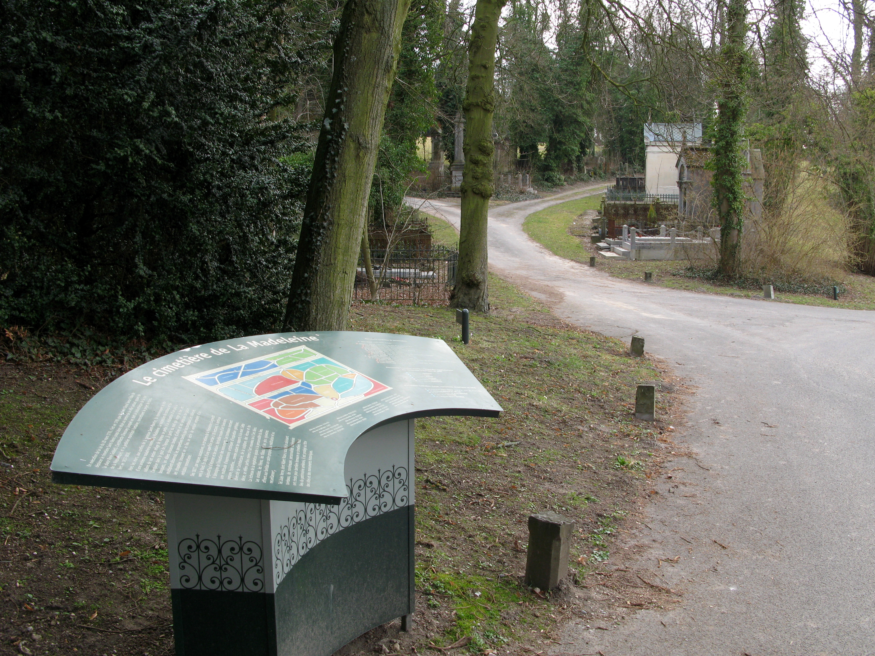 Amiens (Somme, France) - La table d'orientation installée peu après l'entrée du cimetière de La Madeleine, à droite du pavillon abritant le bureau du gardien et la crématorium. Plusieurs sentiers sinueux mènent entre les arbres vers une multitude de tombes installées sur les pentes.